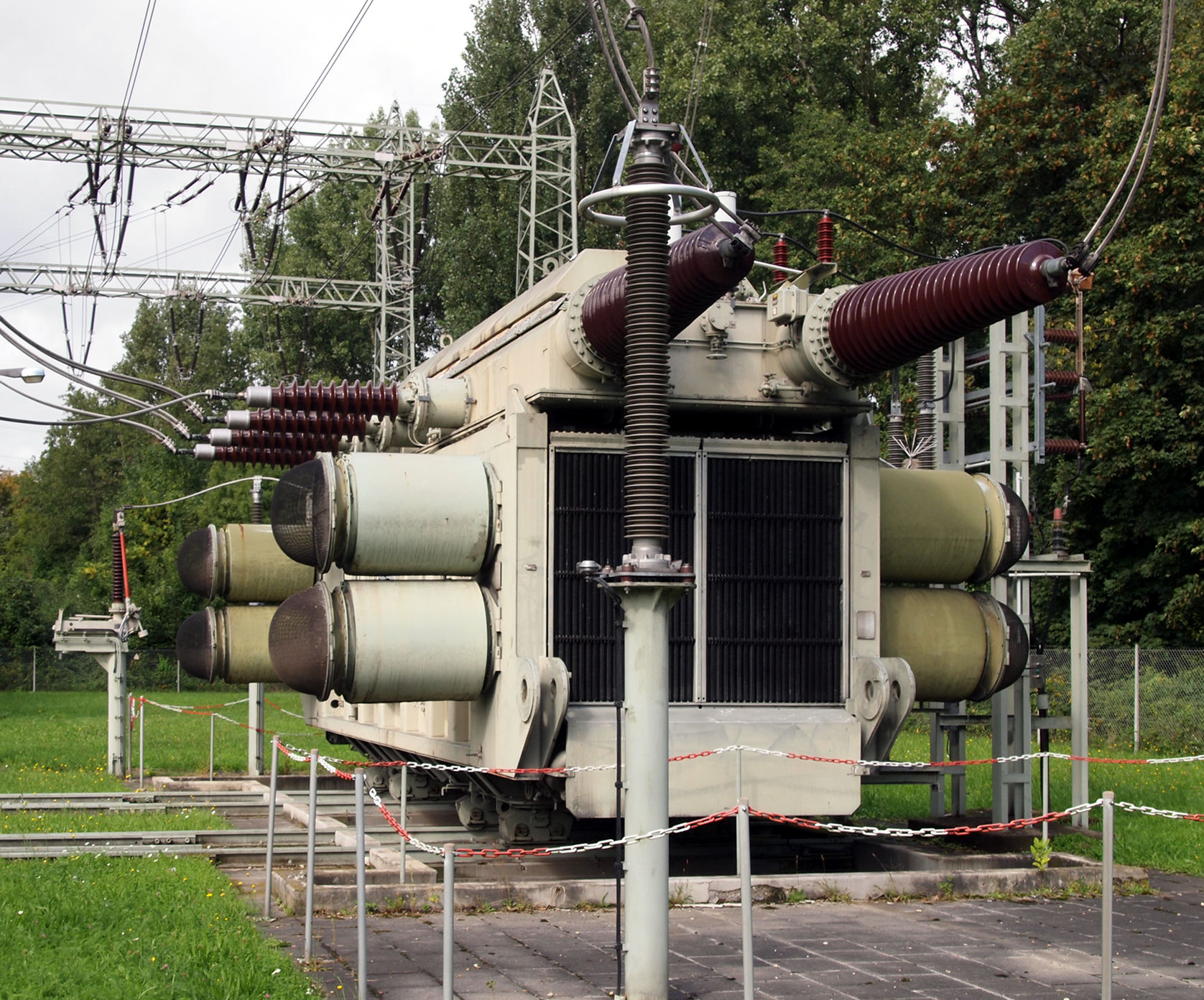 220-kV/110-kV-Transformator im Umspannwerk Karlsruhe-Ost im Elfmorgenbruch